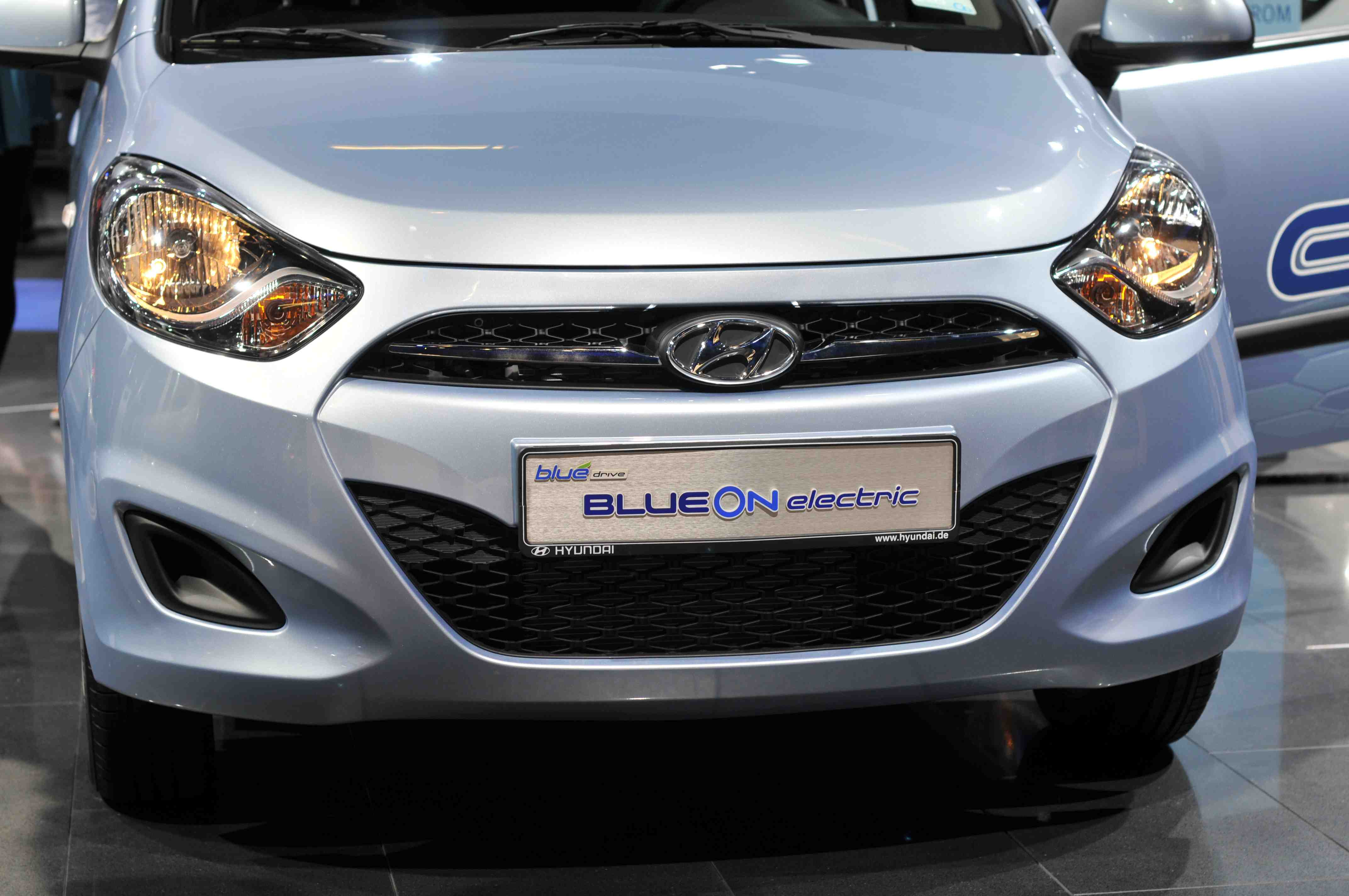 IAA 2011 - Internationale Automobilausstellung in Frankfurt/Main